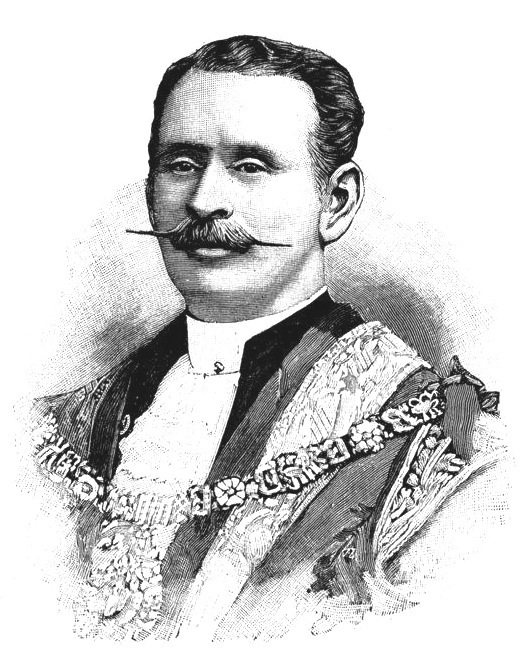 "Sir Joseph Renals, lord-maire de Londres".